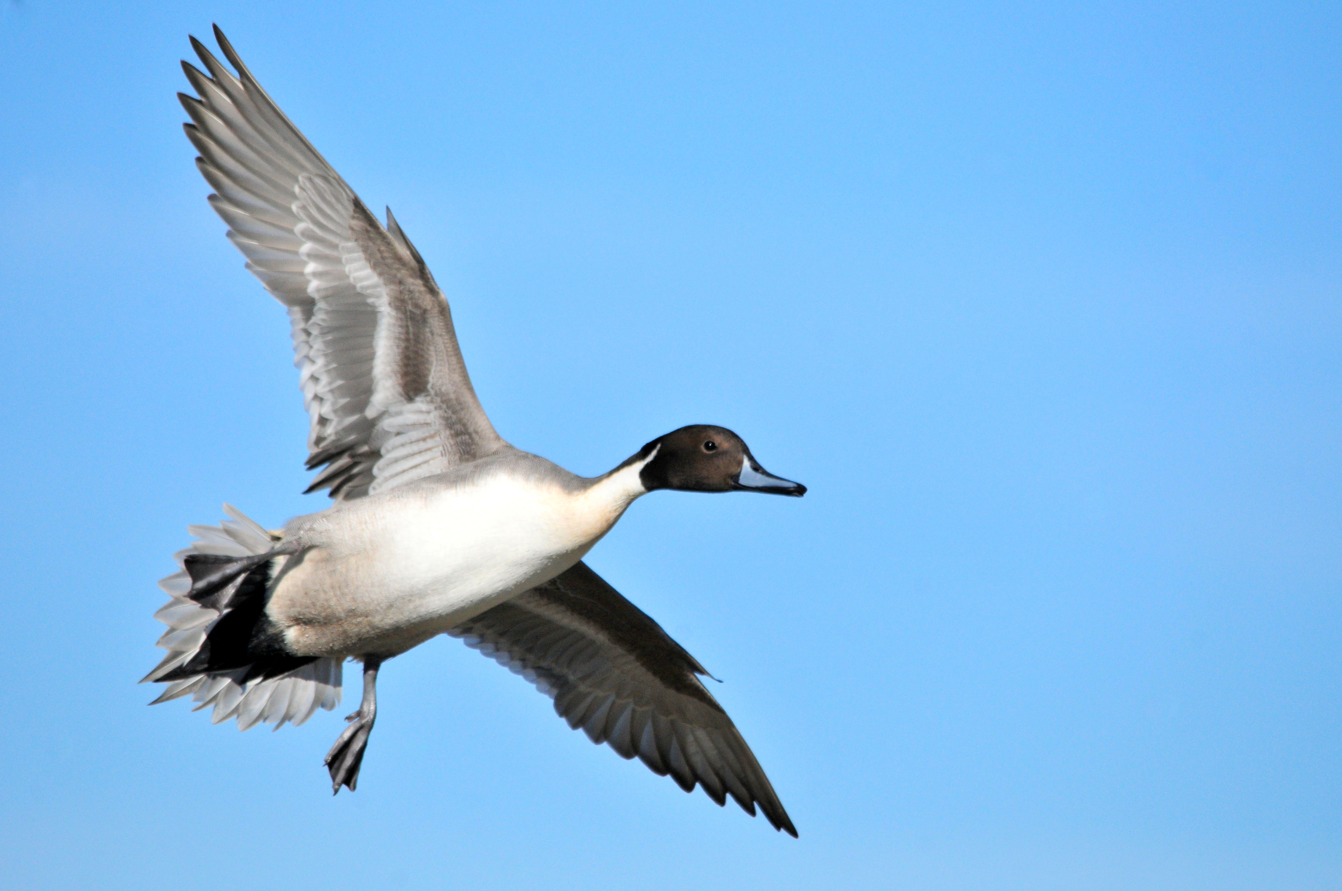 Photo: Tom Koerner/USFWS